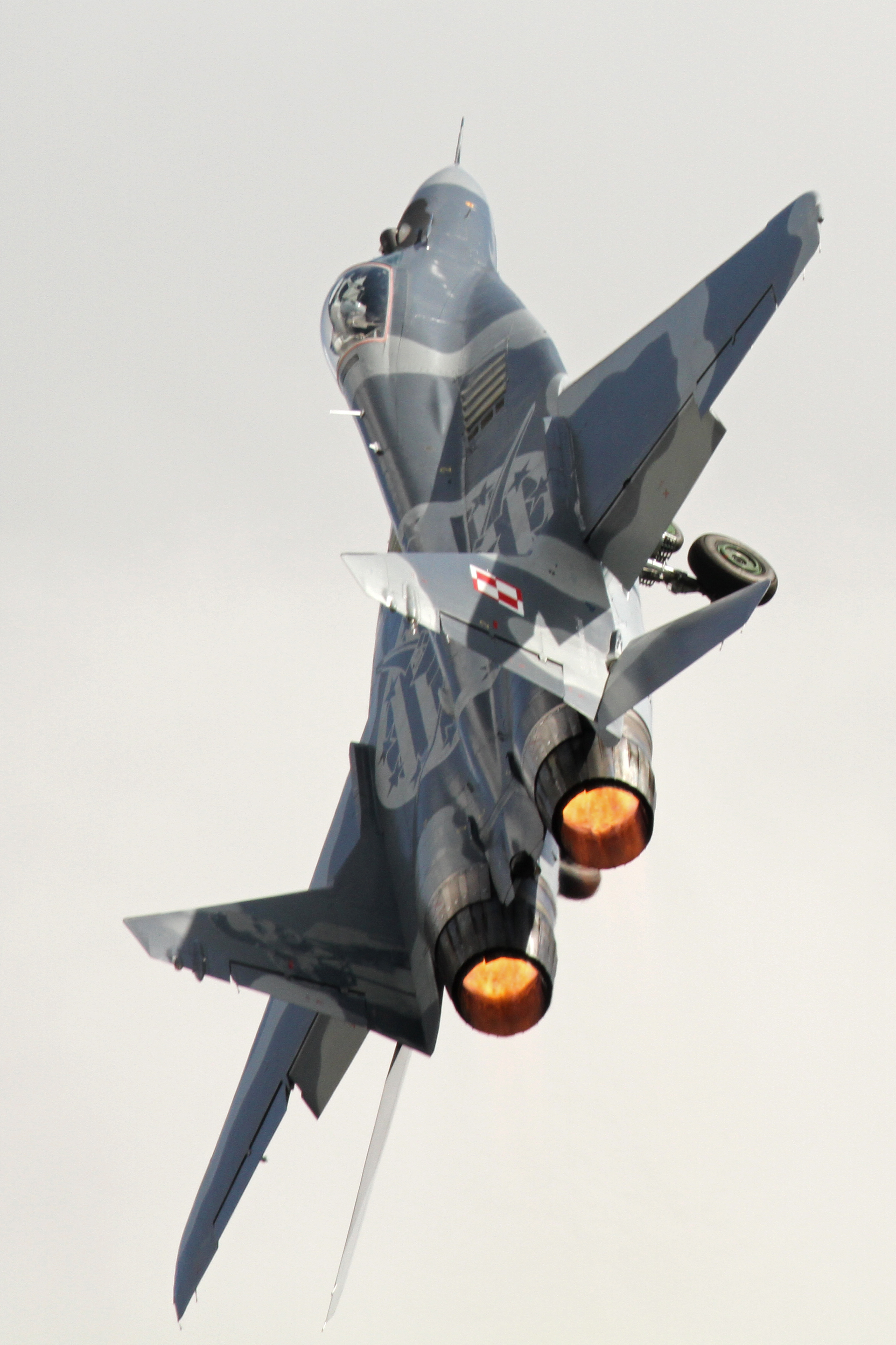 Mikoyan MiG-29A Fulcrum 06